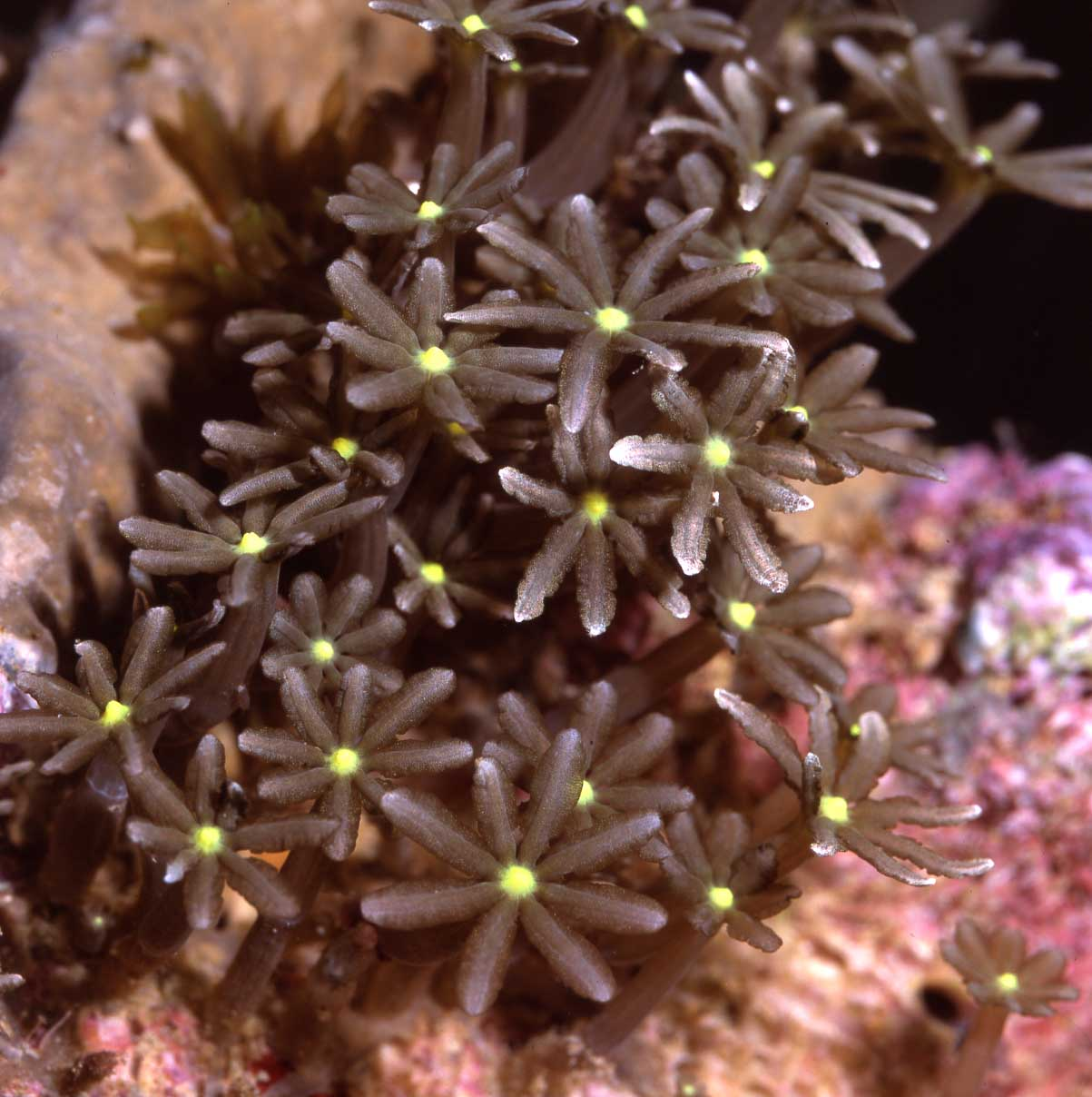 Die Röhrenkoralle Knopia octocontacanalis